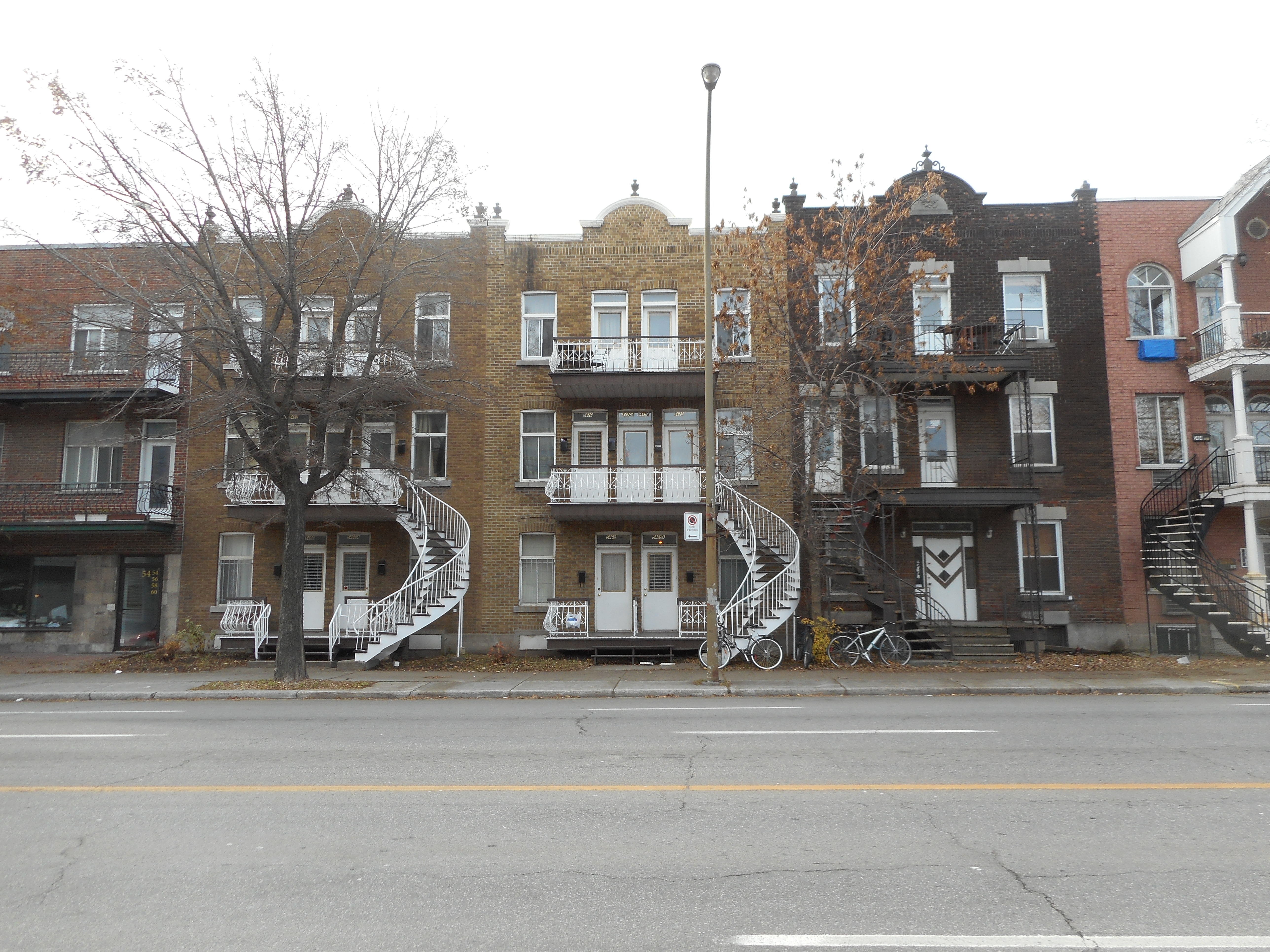 Maisons en rangée, 2 sextuplex et 1 triplex, 5462 à 5478, rue Saint-Denis, Montréal